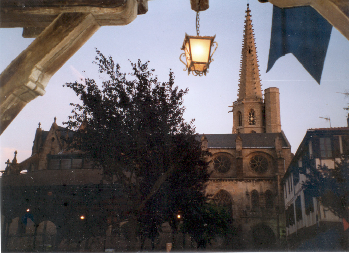 Mirepoix